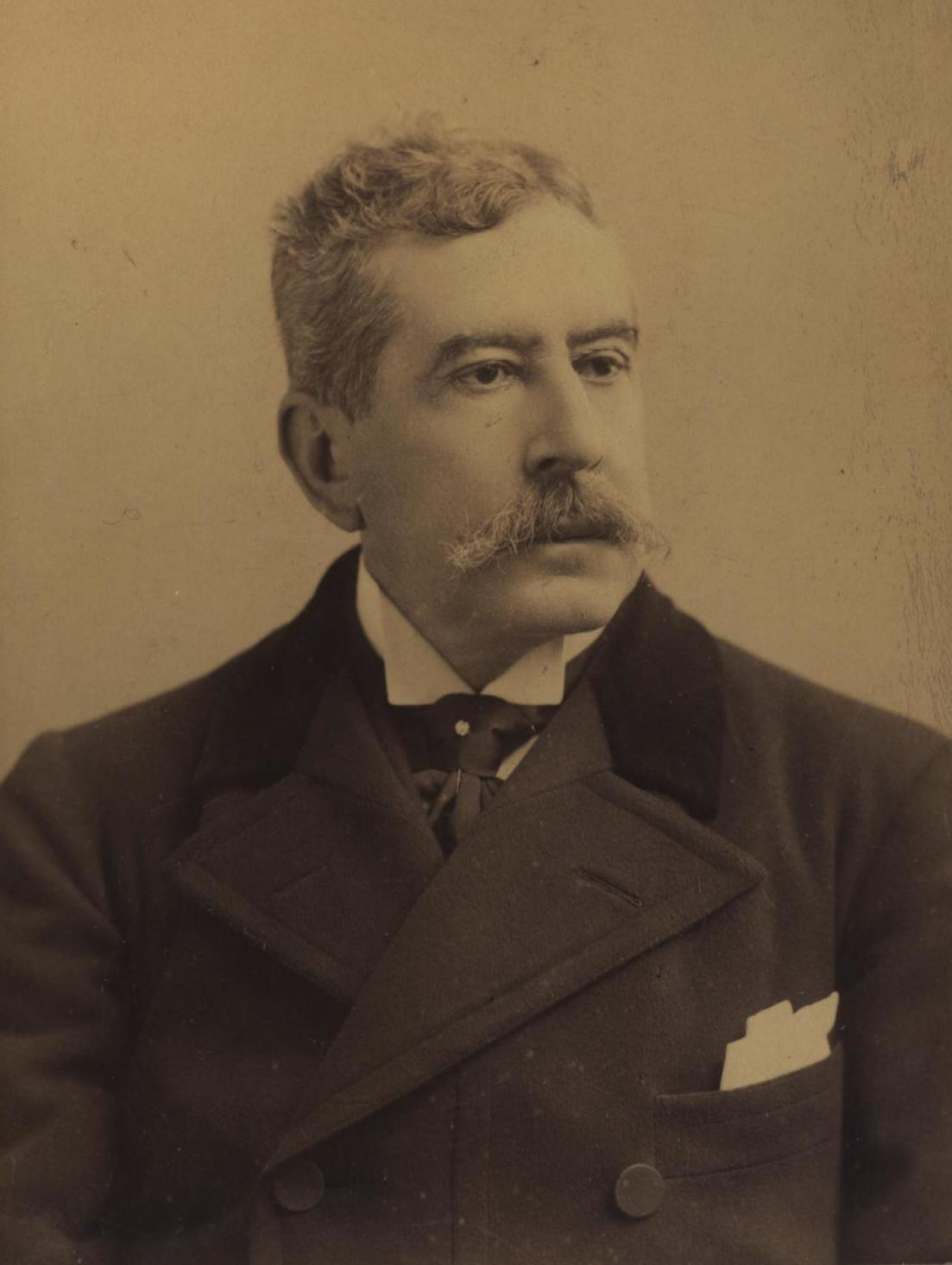 Luis Pereira Cotapos (Santiago, 1835 - 1909), fue un abogado, empresario y político chileno, militante del Partido Conservador. Se desempeñó como diputado, senador y ministro de Relaciones Exteriores, Culto y Colonización.